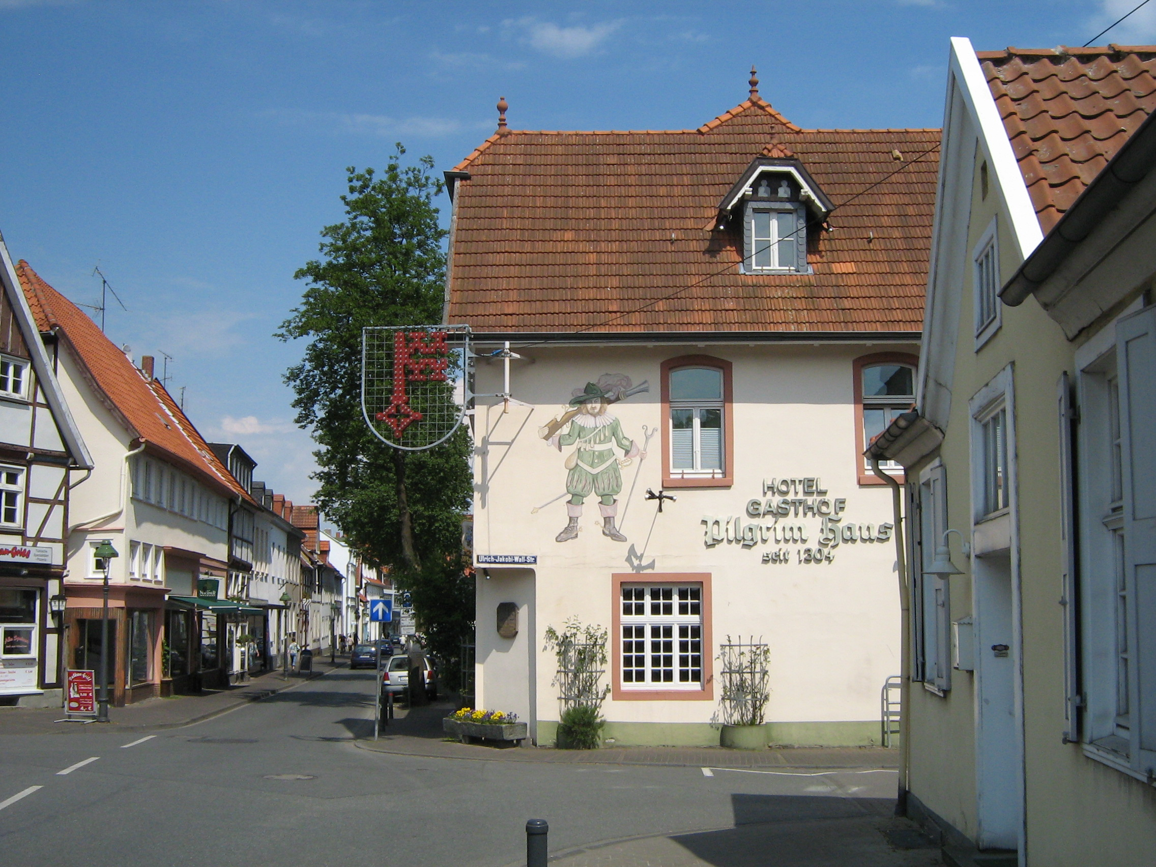 Foto des Pilgrimhauses in Soest, Blick vom Jakobitor aus